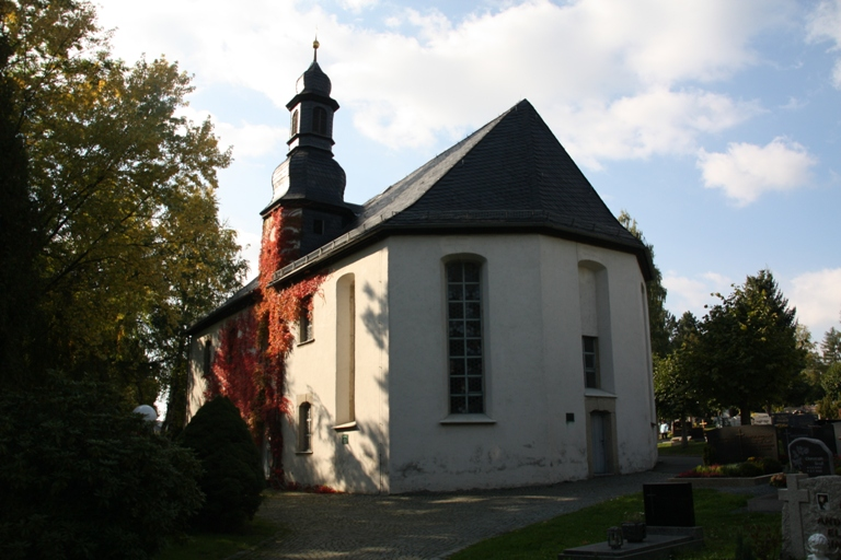 Friedhofskirche in Münchberg